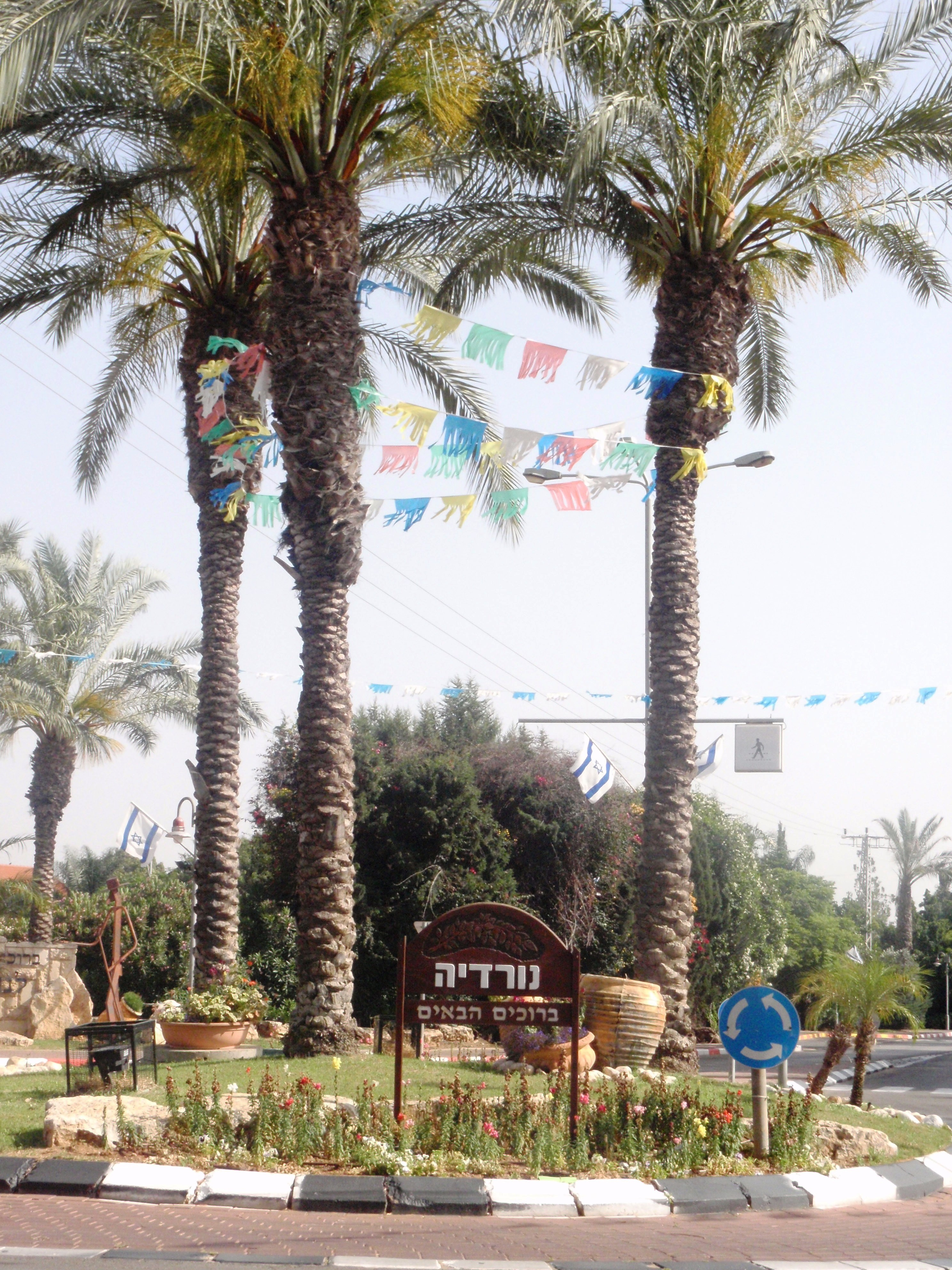 נורדיה